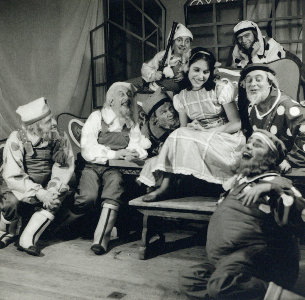 Pavel Golia, Sneguljčica, Slovensko gledališče v Trstu. Na fotografiji: Miranda Caharija (Sneguljčica), Škratje: Josip Fišer, Just Košuta, Ferdo Kokošar, Silvij Kobal, Jože Cesar, Adrijan Rustja, Edvard Martinuzzi.